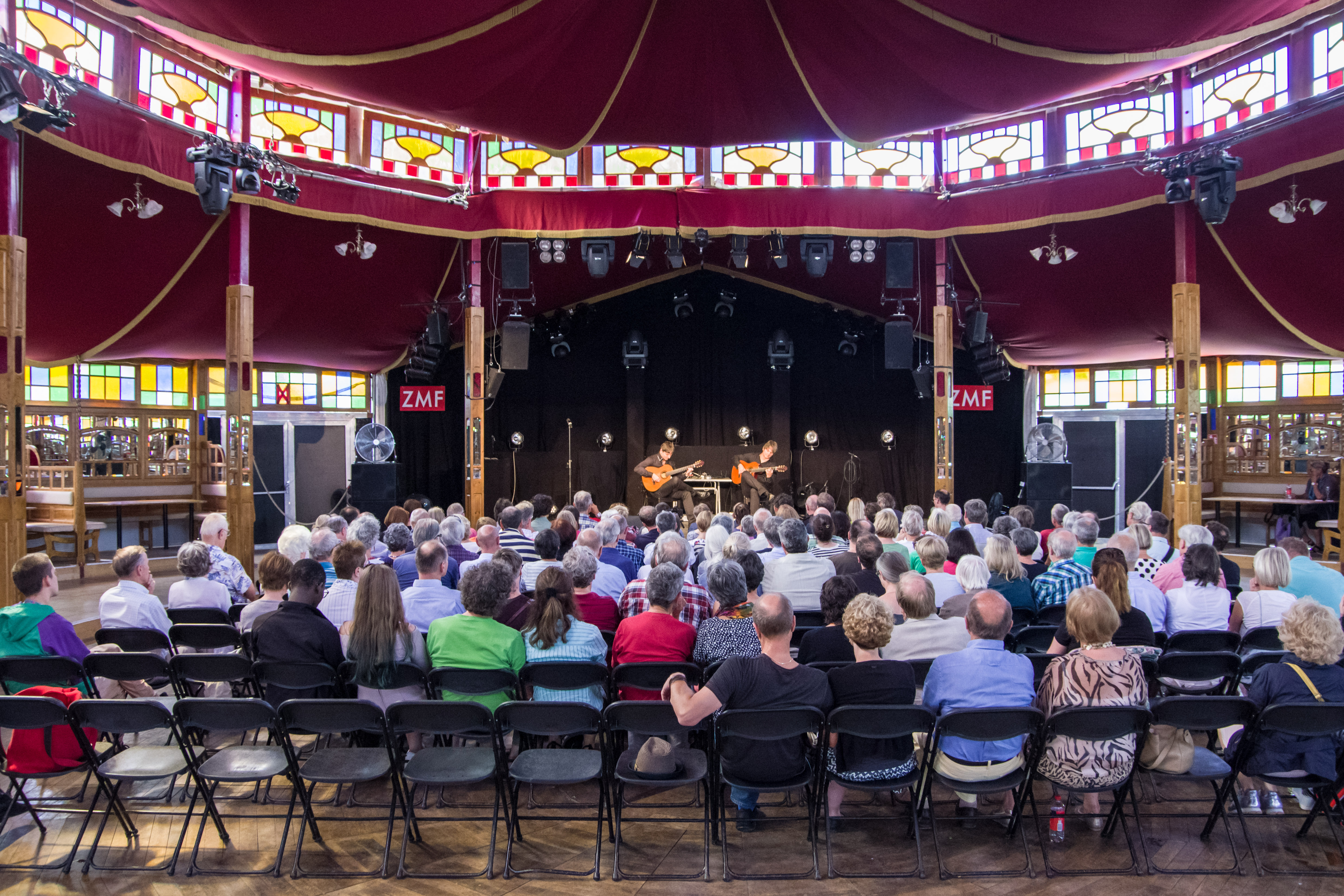 Das Zelt-Musik-Festival 2017 in Freiburg im Breisgau Klassik-Matinée am 16.07.2017 Katona Twins